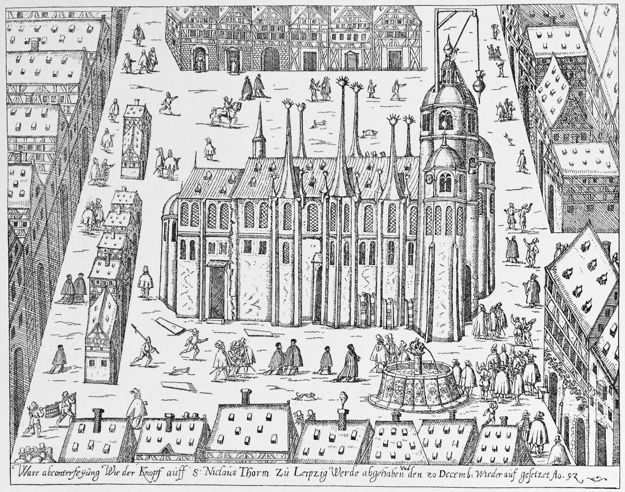 Die Leipziger Nikolaikirche 1592, dargestellt bei der Abnahme des Turmknaufs zur Kontrolle auf calvinistische Schriften